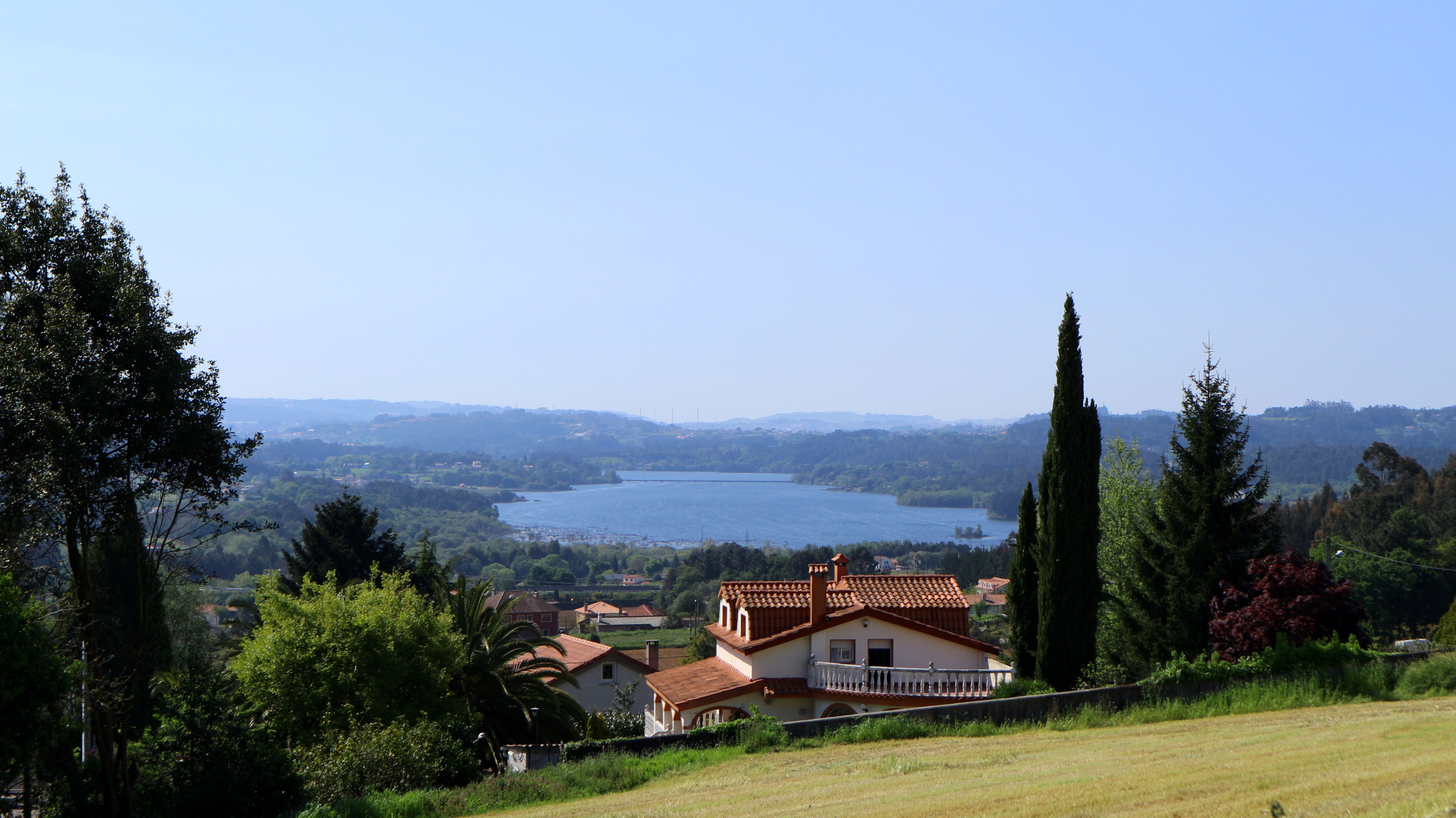 Vistas do encoro de Cecebre desde a igrexa de Requián. Requián, Betanzos.